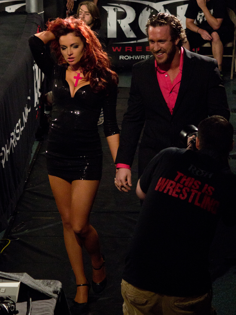 Maria and Bennett Exit